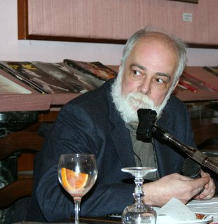 Fotografia di Alfredo Castelli al VII Martin Mystère Mystery Fest tenutosi a Firenze il 18-19 marzo 2006